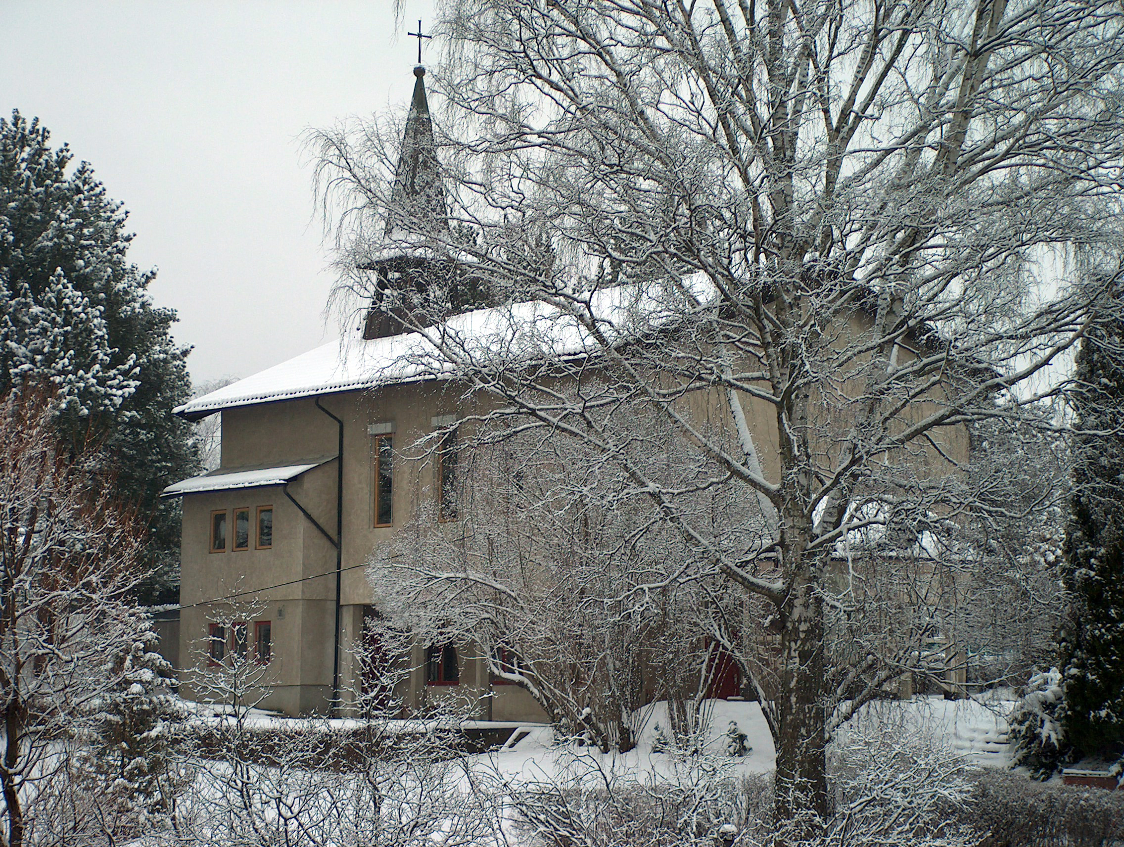 Sankta Theresia katolske kirke, Hønefoss